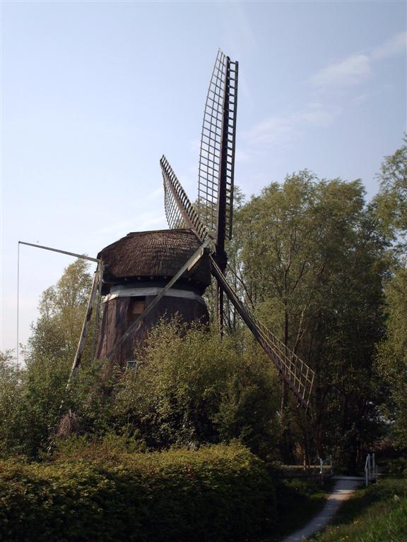 De Rietvink, molen bij Nijetrijnje